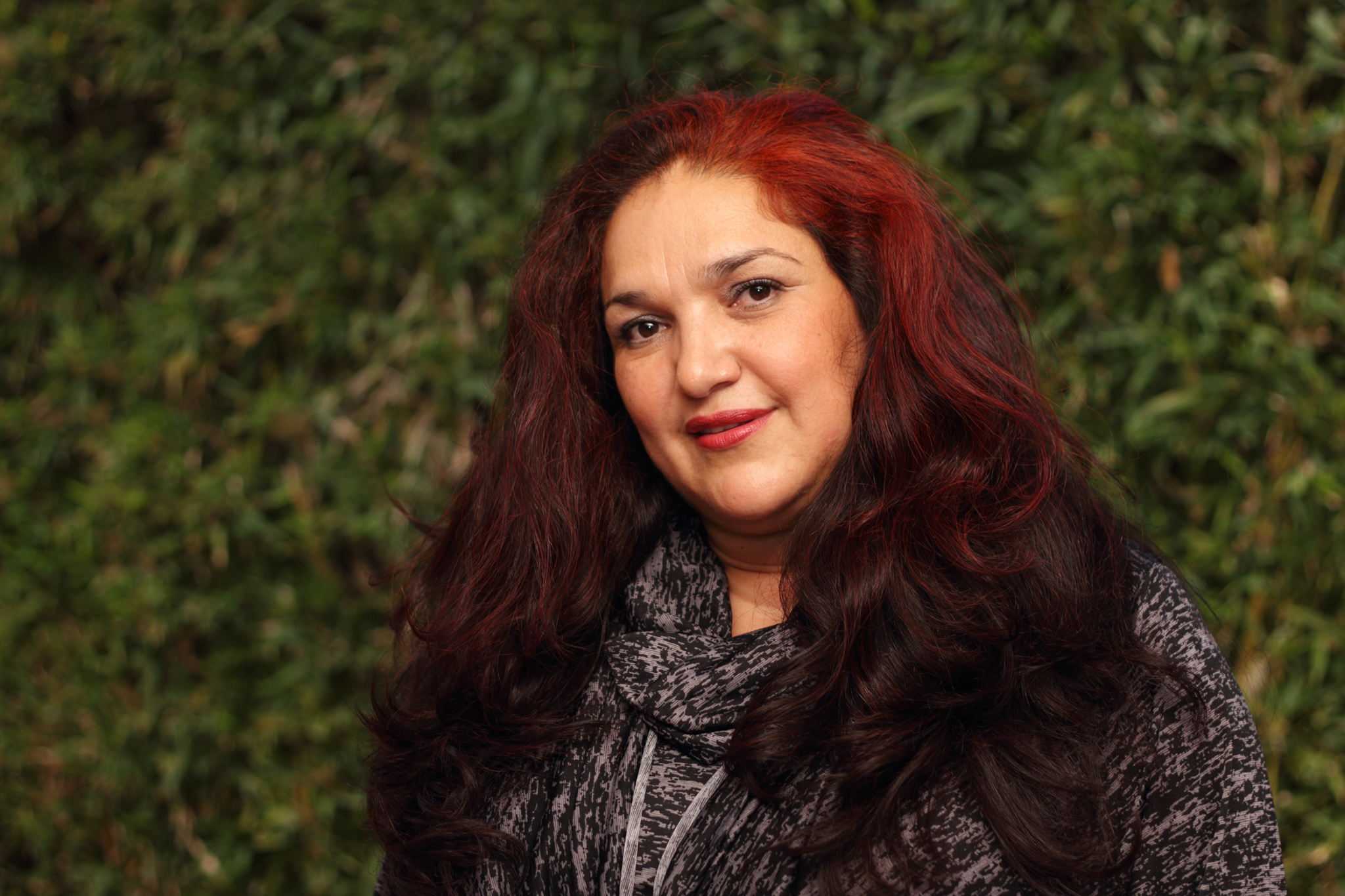 fotografía por: Harumy Herrera